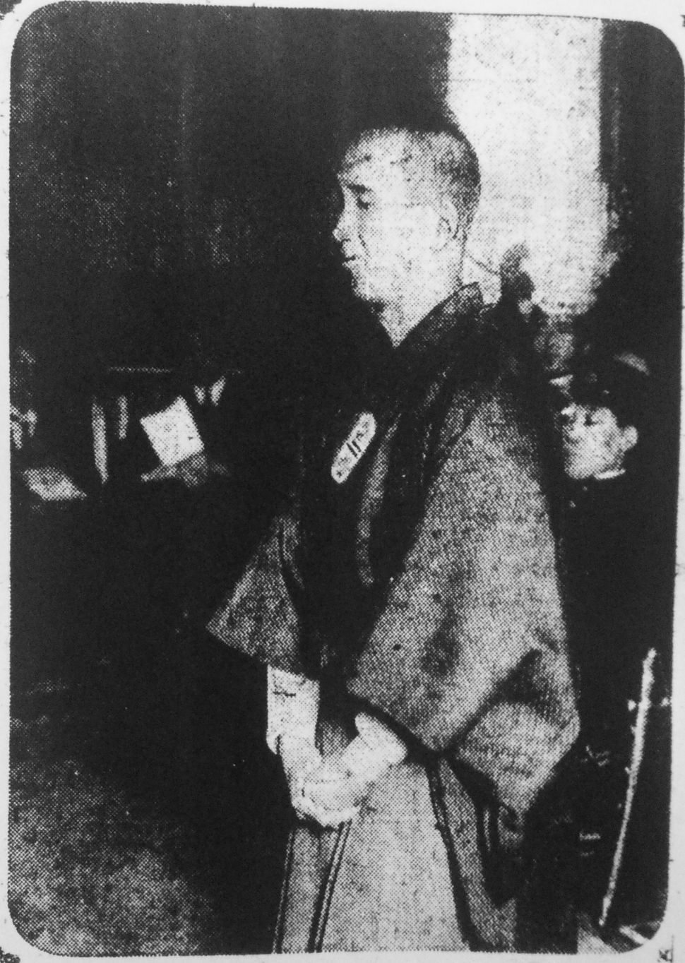 小笛事件一審判決言渡し時の広川条太郎